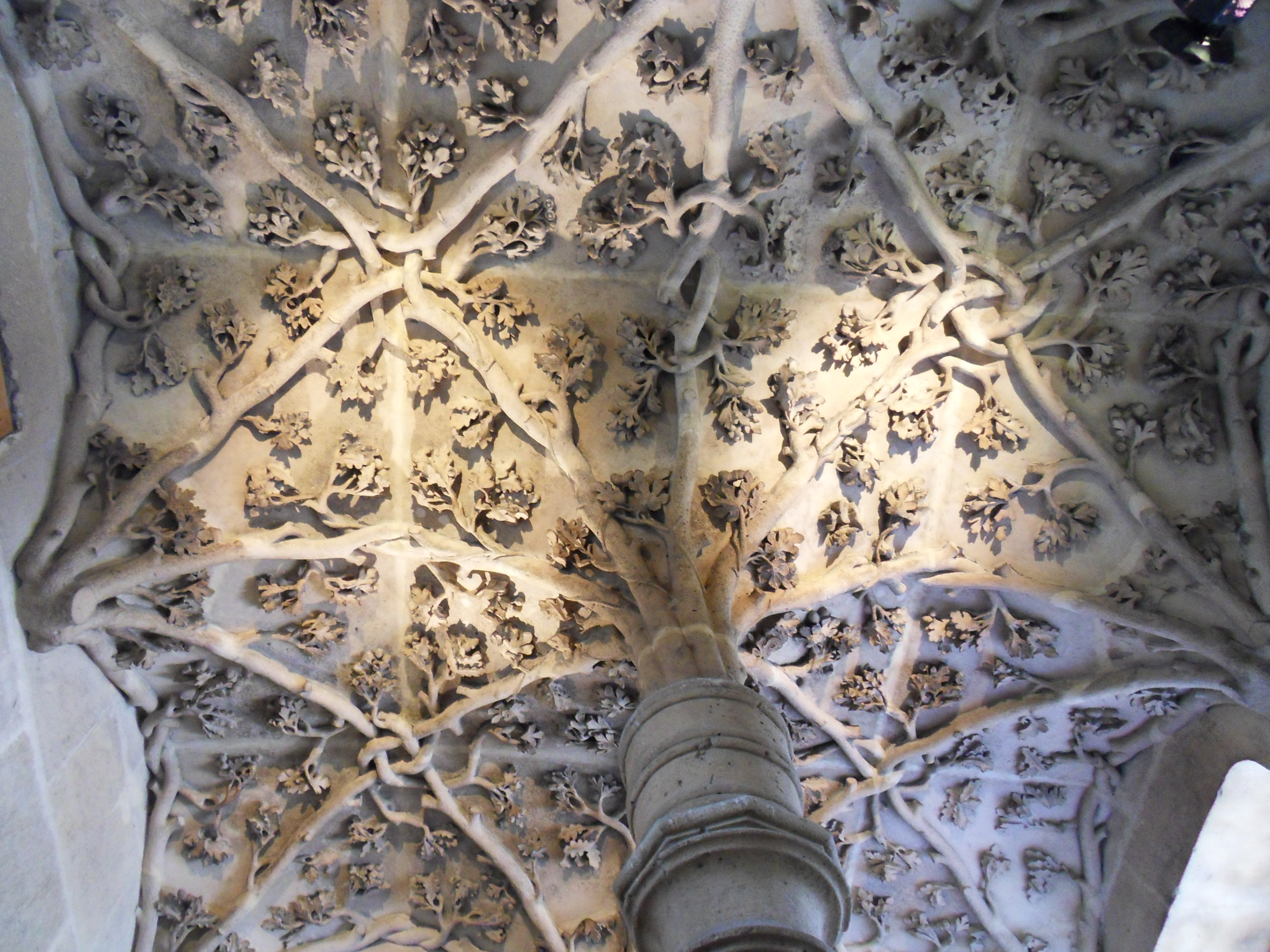 Voûte de l'escalier de la Tour Jean sans peur, à Paris